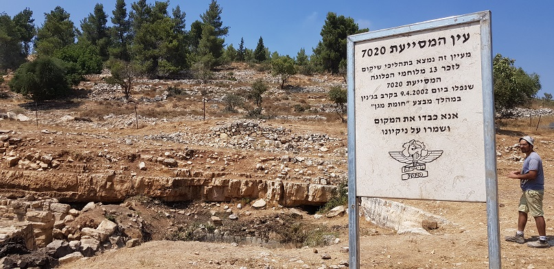 שלט במעיין